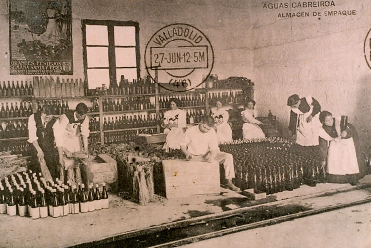 Verín (Ourense). Aguas Cabreiroá. Almacén de empaque. Postal circulada en Valladolid el 27 de junio de 1912 - Valladolid - Postal B/N